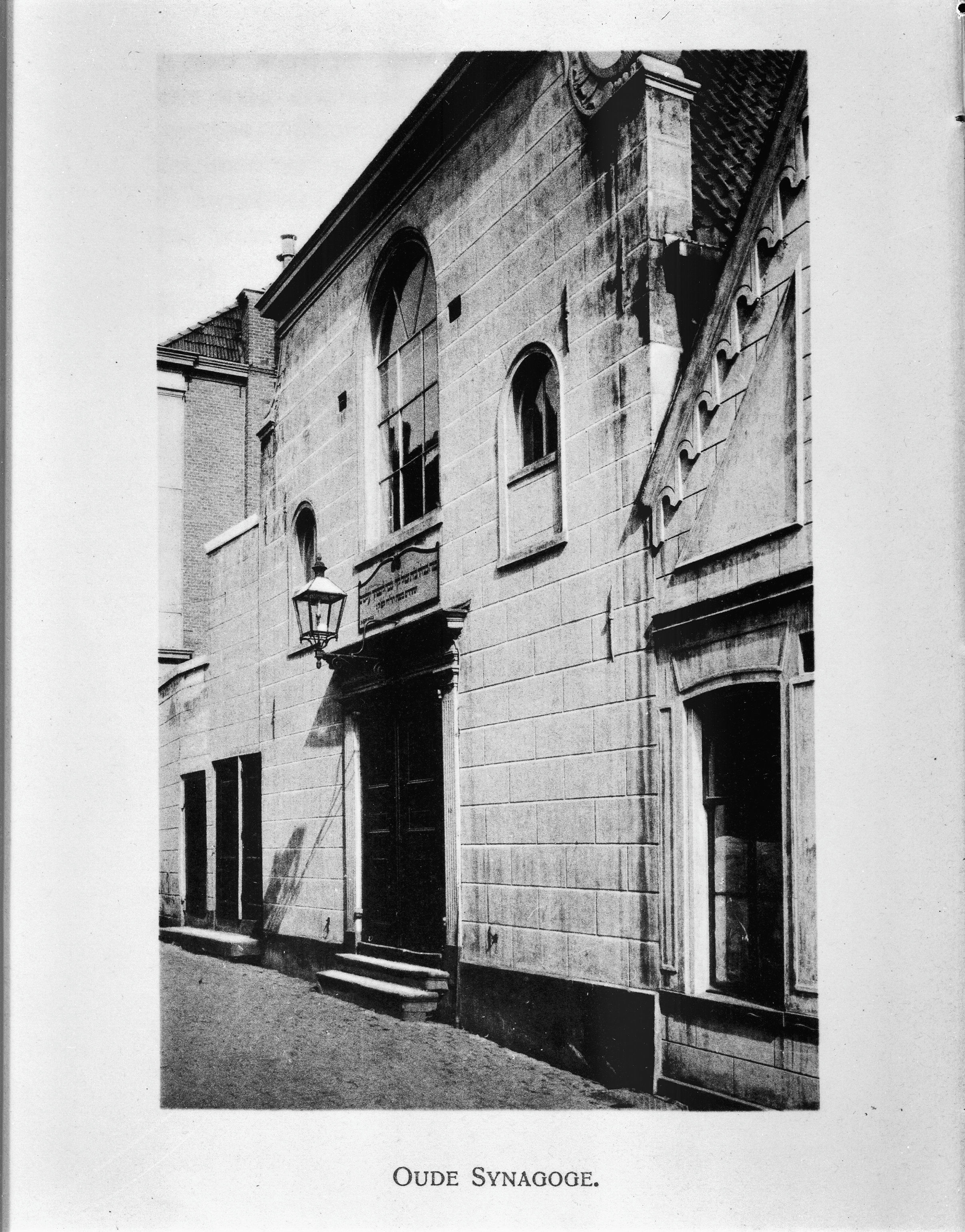 Oude synagoge: Voorgevel van oude synagoge te Groningen